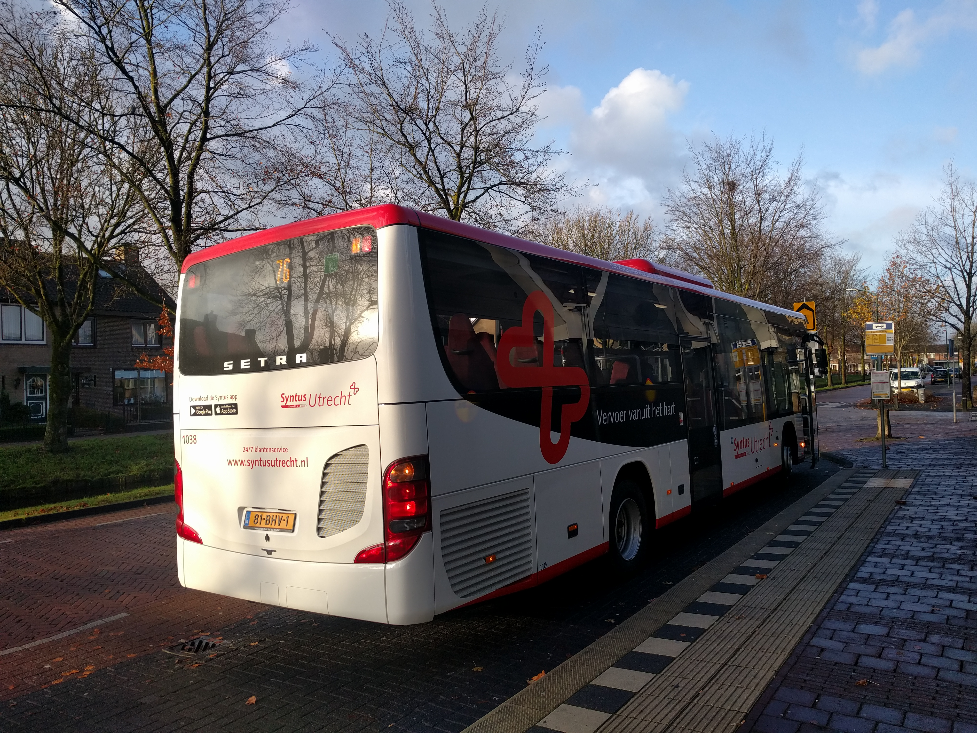 Lijn 76 van de nieuwe concessie Utrecht die als eerste bus van Syntus de halte Broerswetering in Spakenburg passeert.